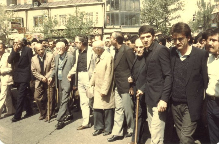 دکتر سحابی، دکتر یزدی و مهندس بازرگان